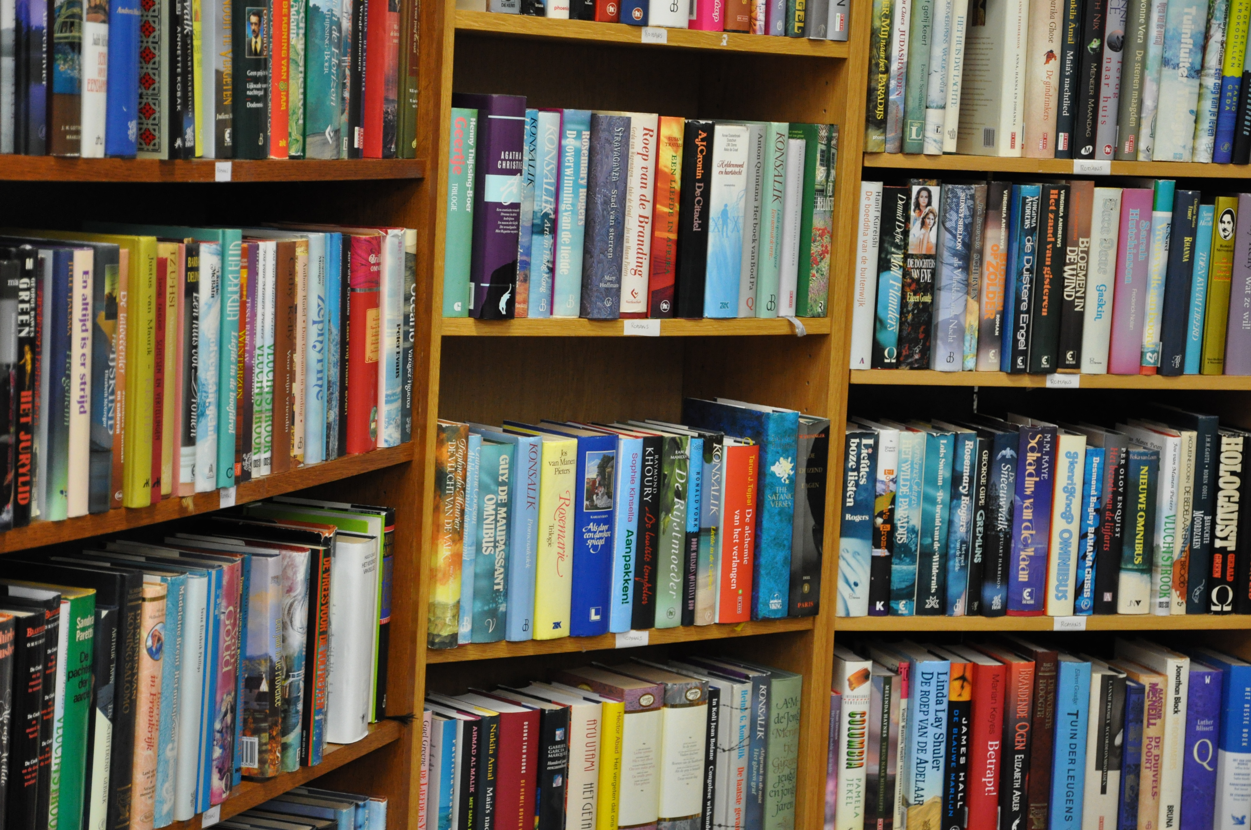 Boeken in de kringloopwinkel in Woerden.